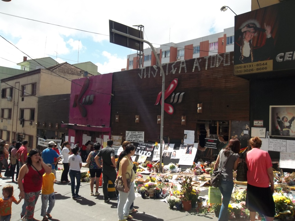 Boate que sofreu incêndio no município de Santa Maria - RS.